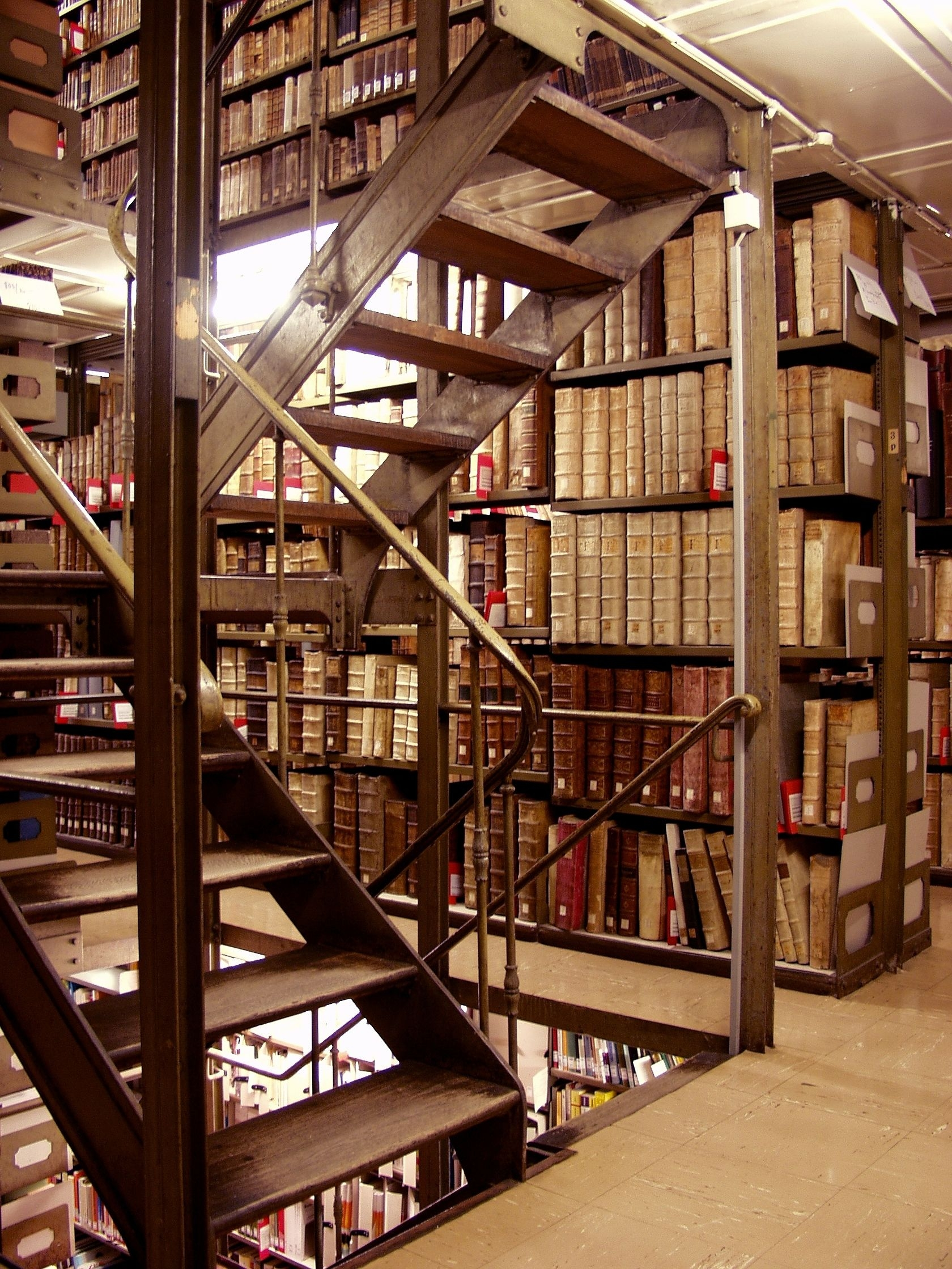 Lipman-Regale im Büchermagazin der Wissenschaftlichen Stadtbibliothek Mainz.